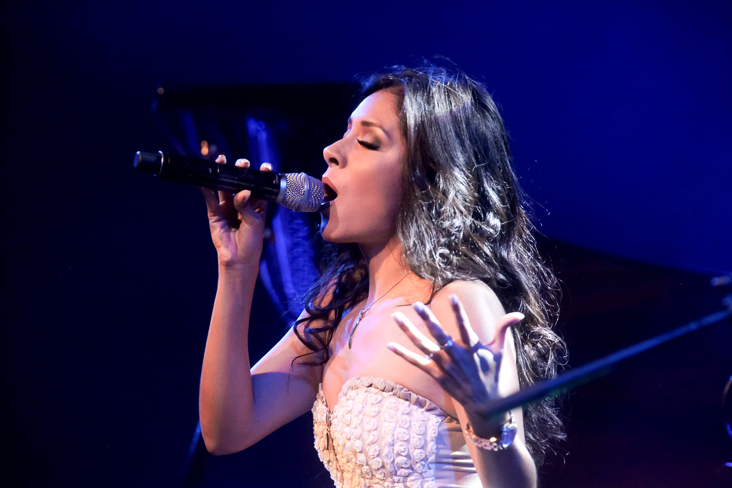 En vivo